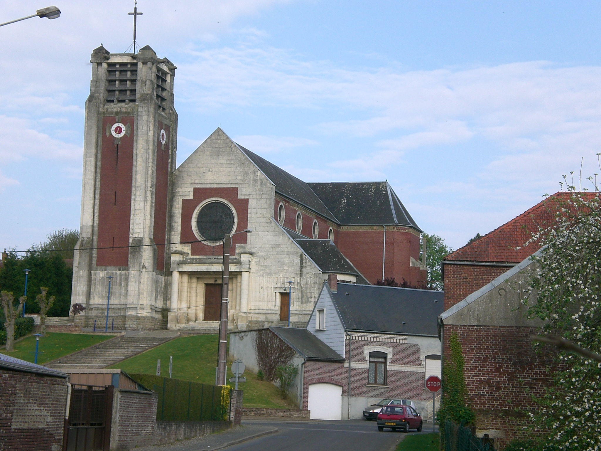 Église de Moislains due à l'architecte Louis Faille, au 1er mai 2010.